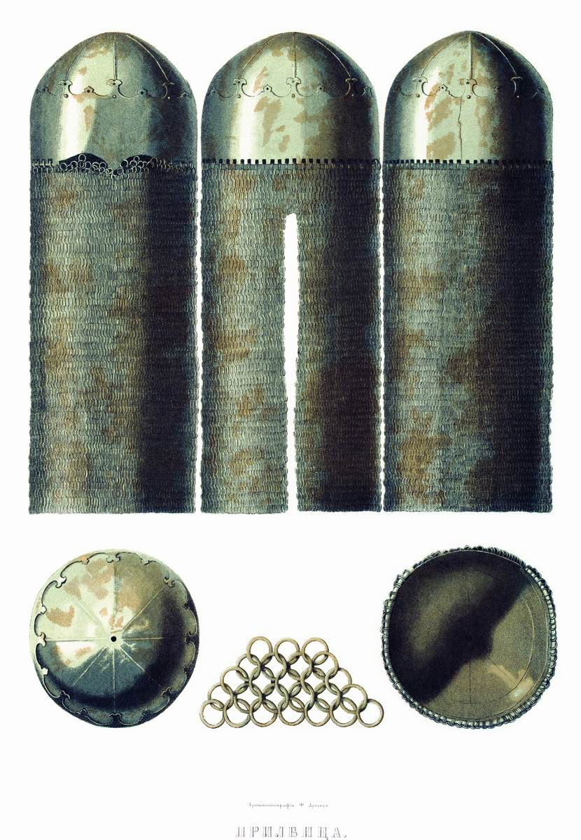 Мисюрка-приблица